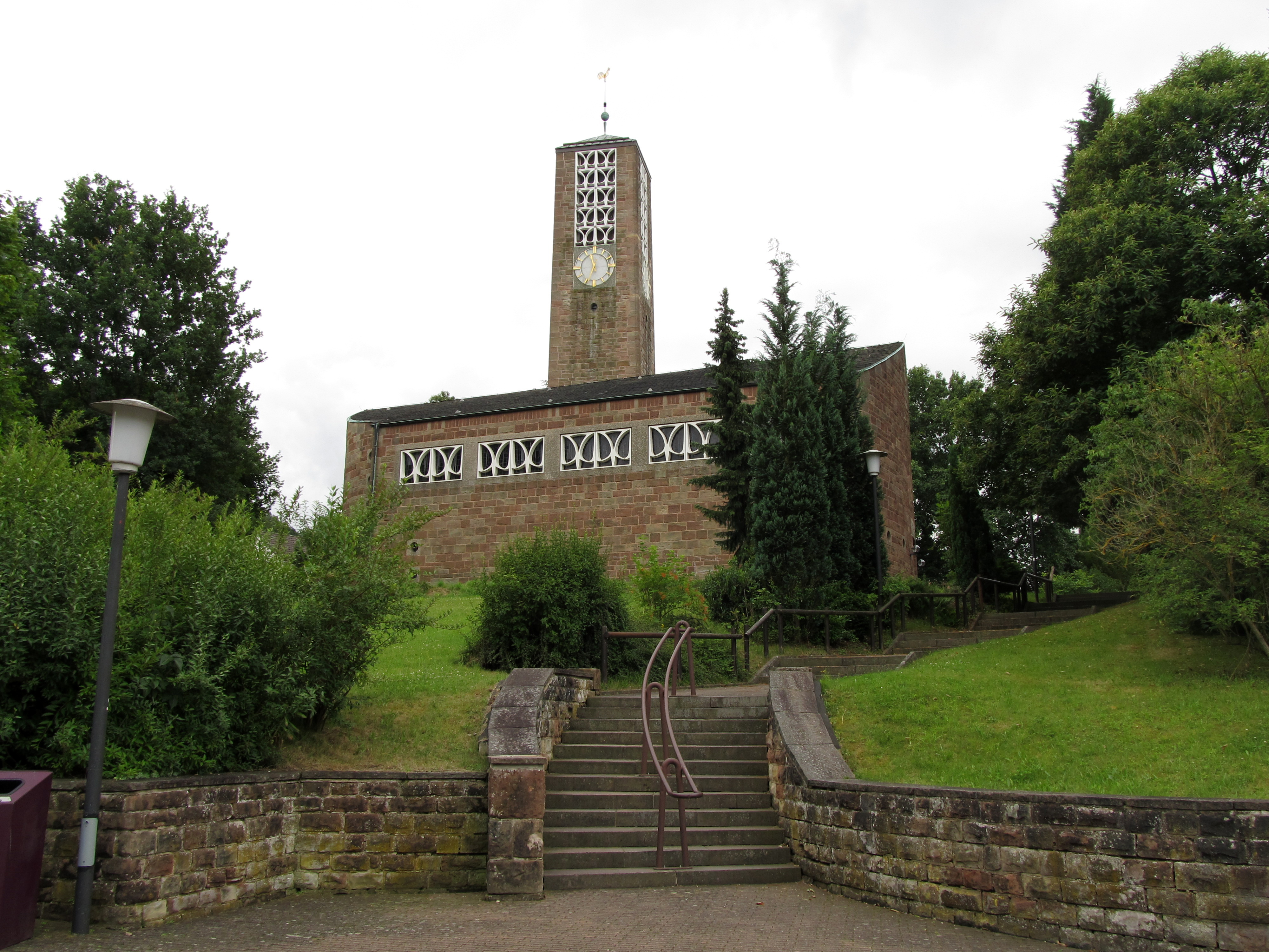 Die protestantische Christuskirche in Schwarzenacker, Saarland